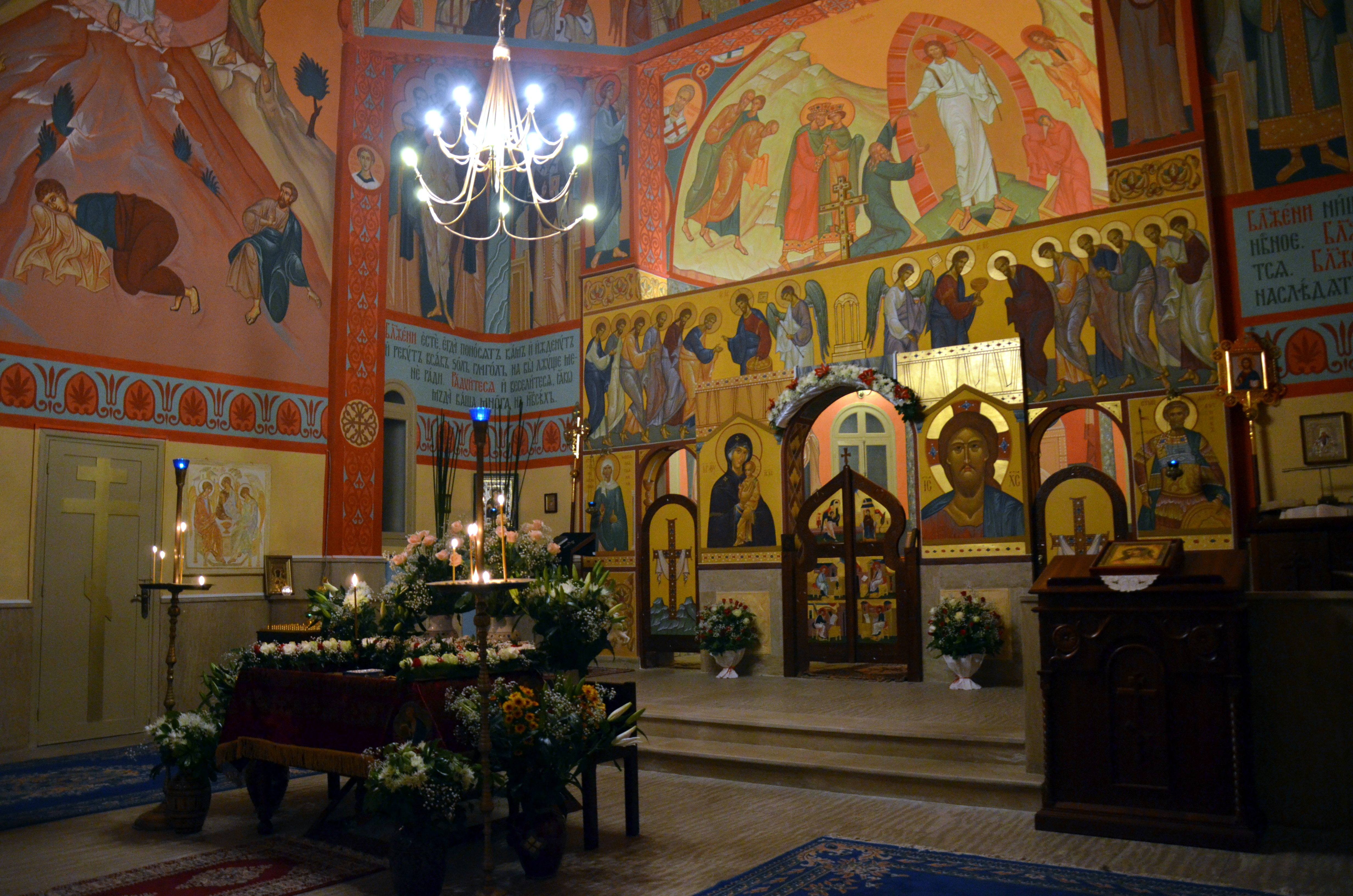 Воскресенский храм Русской Православной Церкви в Рабате